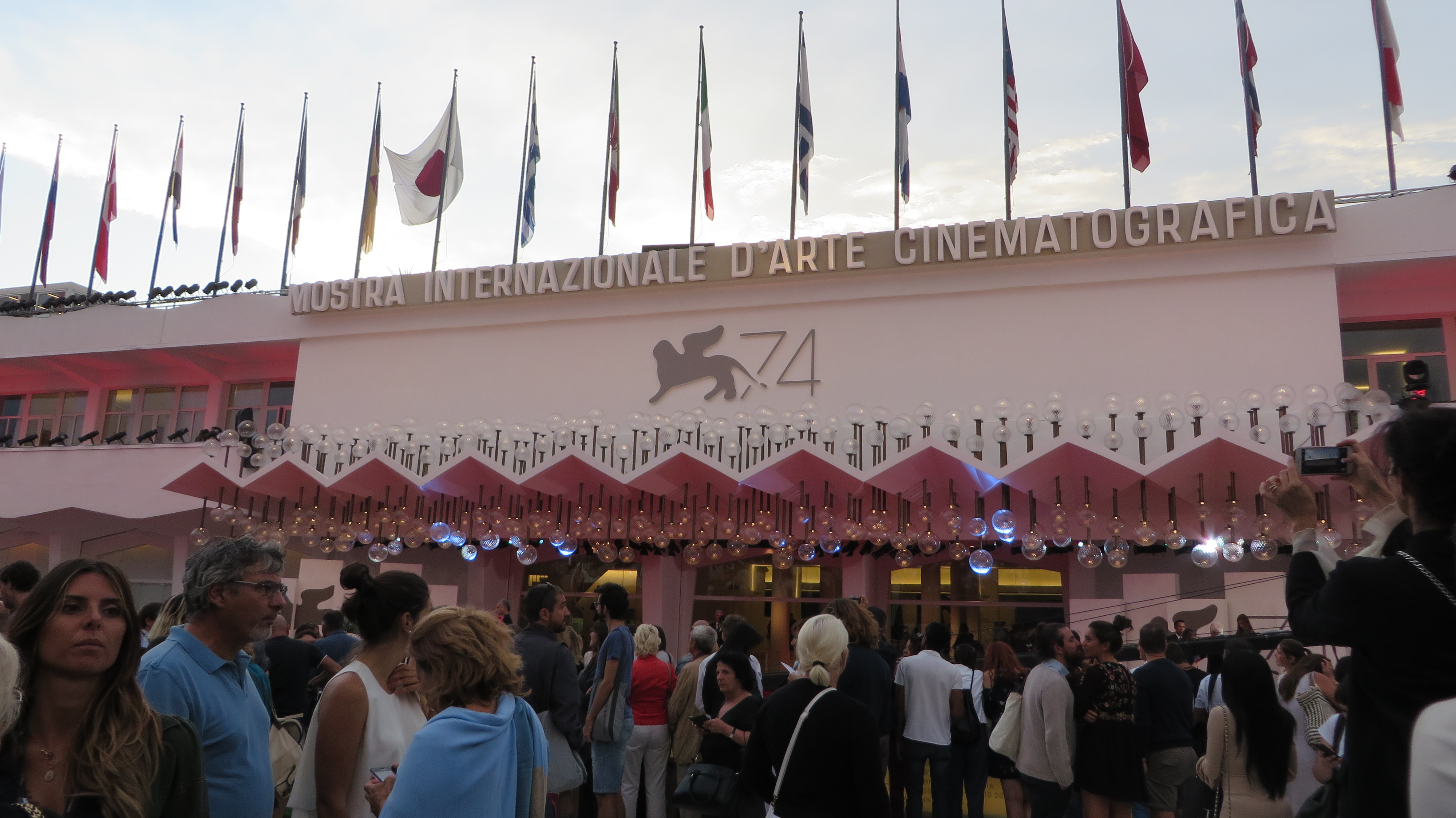 74 Venice Film Festival - 2 September 2017